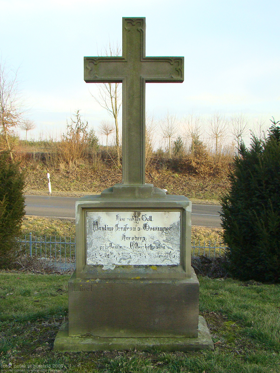 Grabmal für Freifrau Pauline von Gemmingen-Hornberg geb. Freiin von Ellrichshausen in der Familiengrablege der Freiherren von Gemmingen in Bad Rappenau-Babstadt